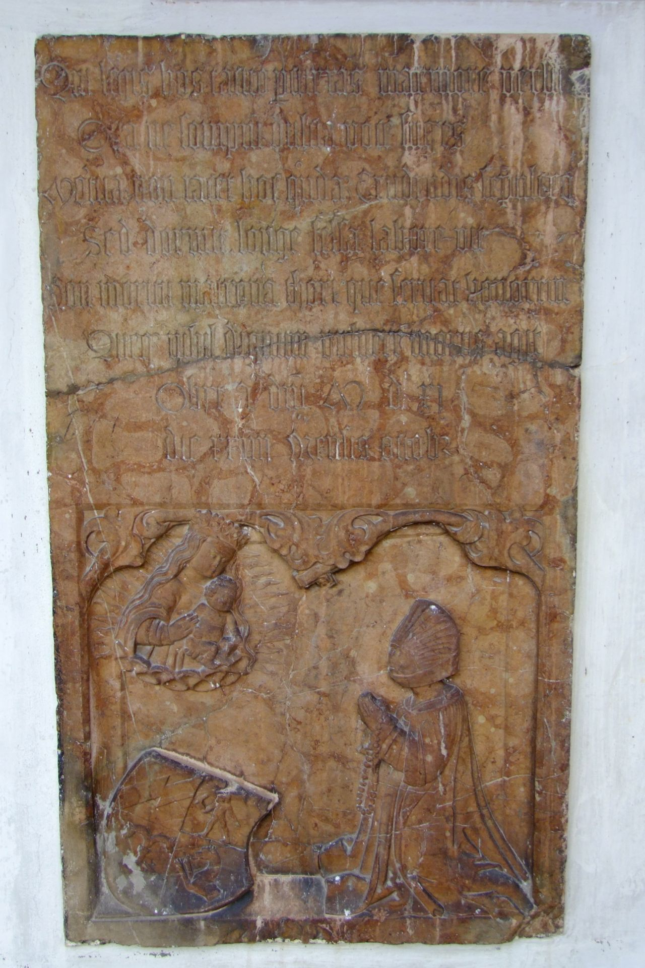 Kath. Pfarrkirche Pauli Bekehrung mit ehem. Friedhof